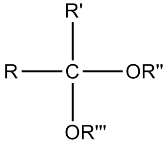 A Generic Ketal